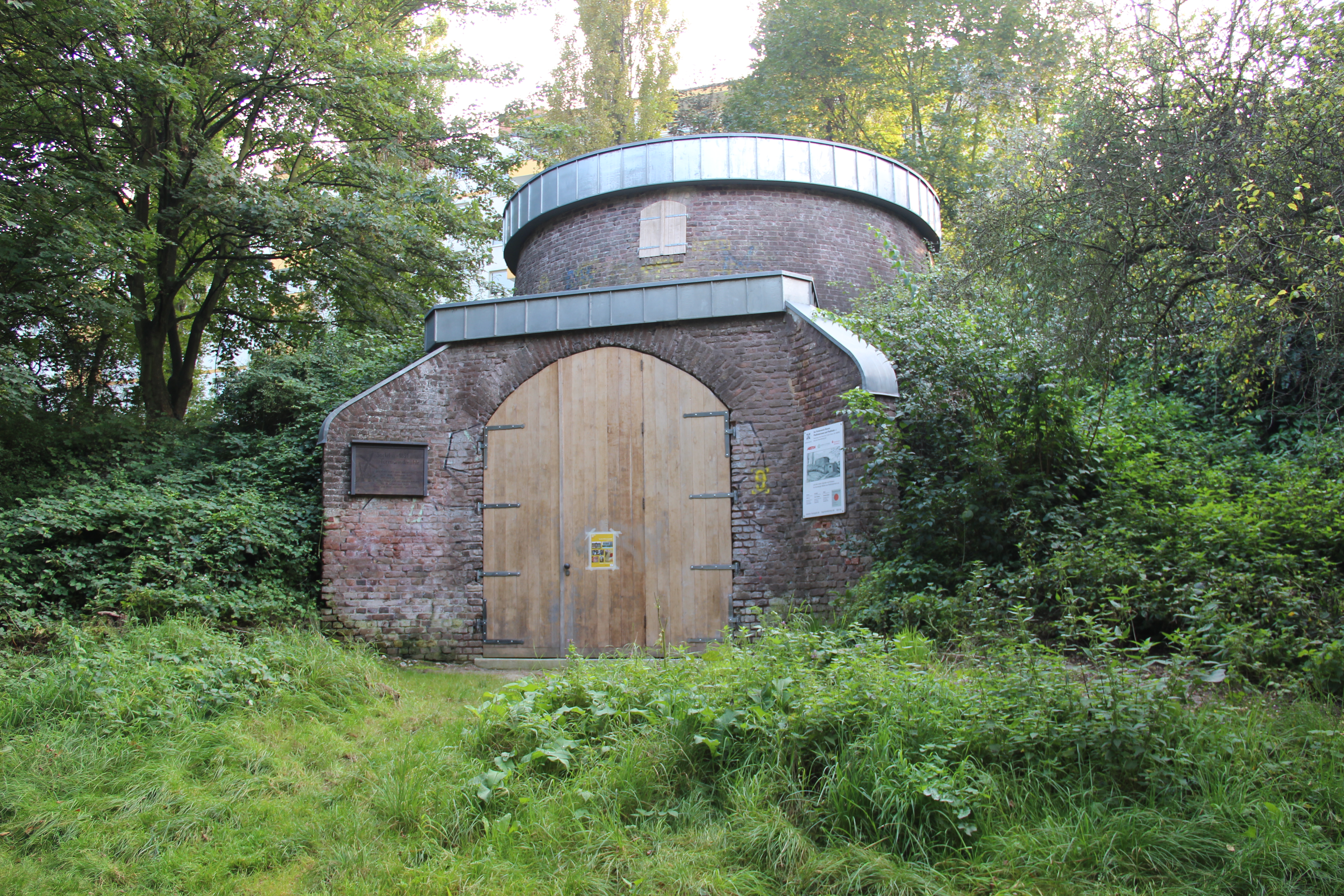 „Mühlenstumpf“ (Sockel einer 1899 stillgelegten Turmwindmühle), An der Rheindorfer Burg (6), Bonn-Auerberg